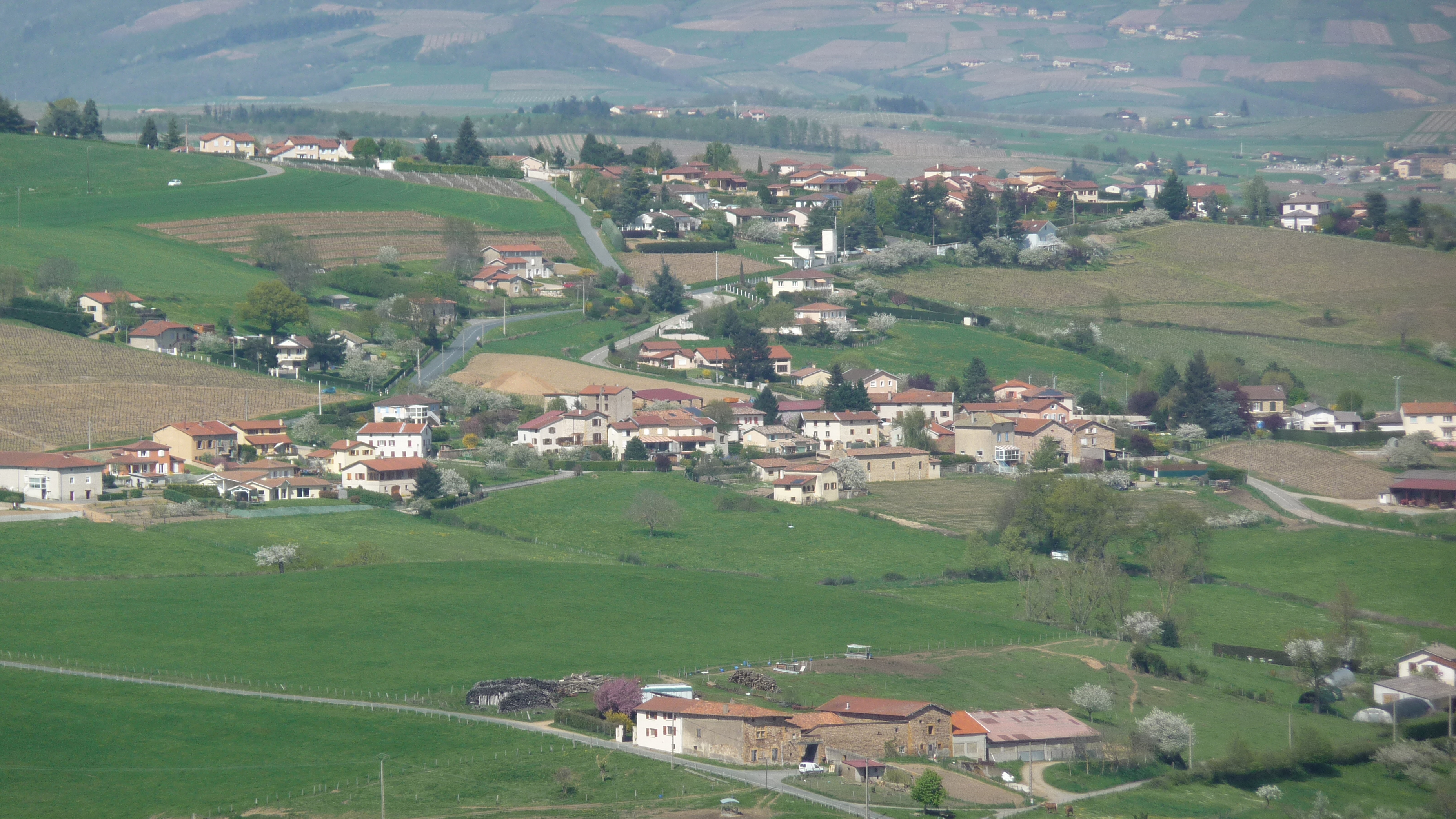 Saint-Loup (Rhône) - Hameau de Vindry